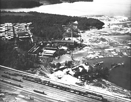 Ångsåg- och tegelbruket i Ludvika, (Ludvika tegelbruk längst fram)